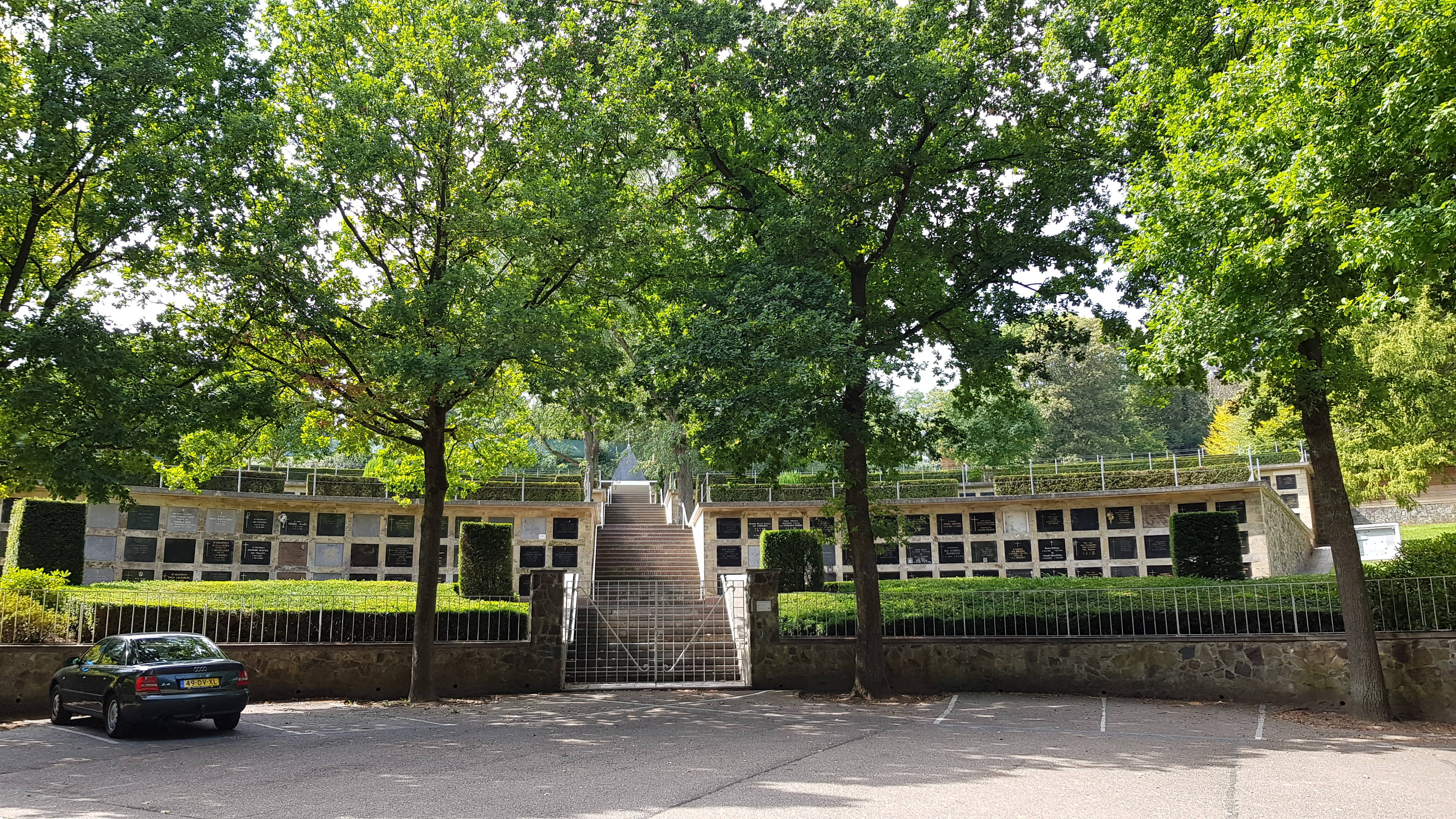 Begraafplaats Cauberg, Valkenburg, Nederland